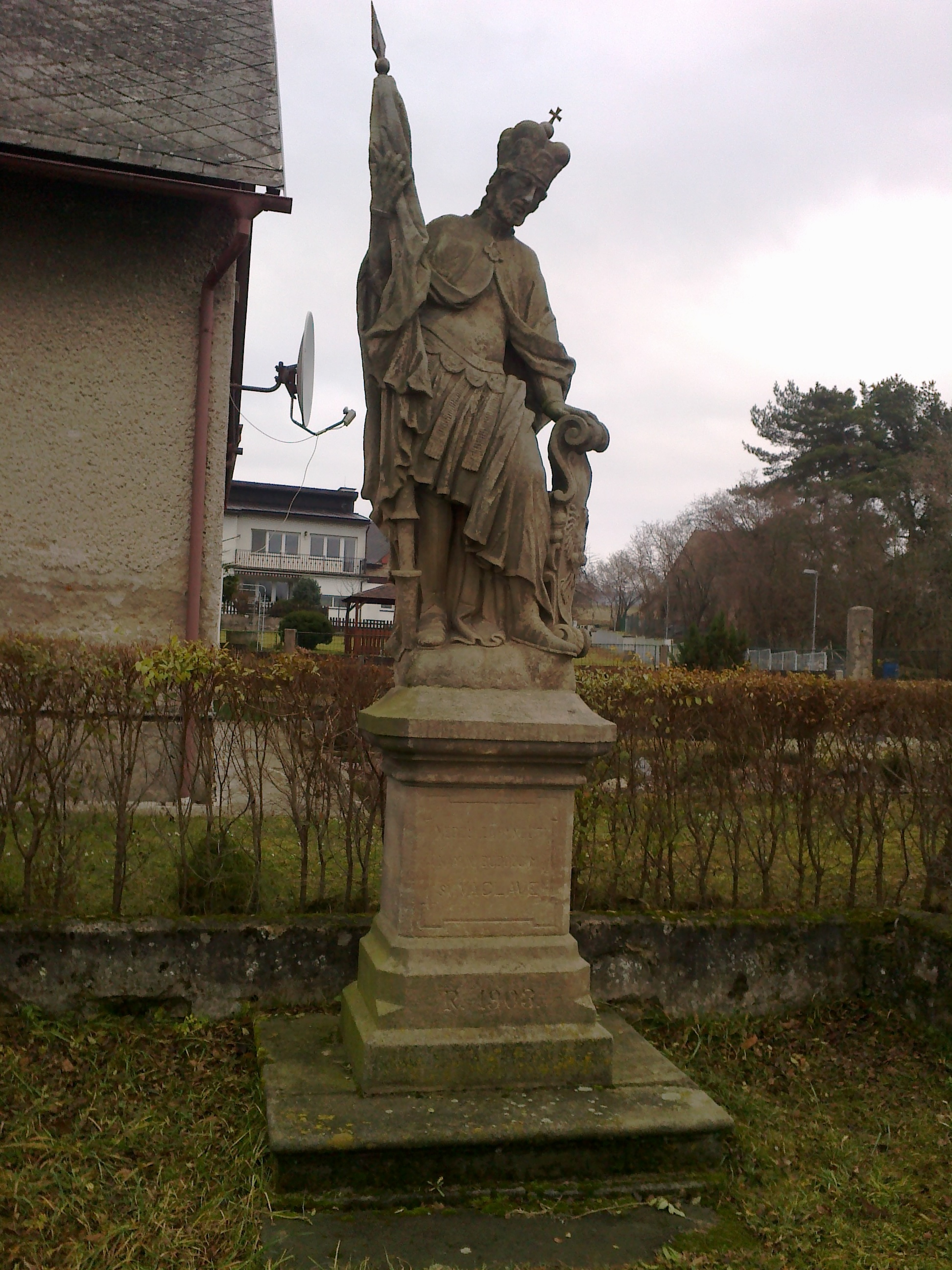 Police nad Metují - socha sv. Václava, Bělská ul.